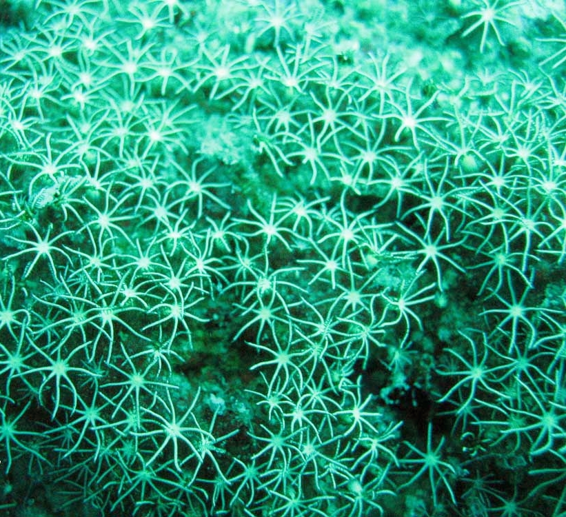 Tubipora musica, "coral órgano", en Koh Phangan, Tailandia